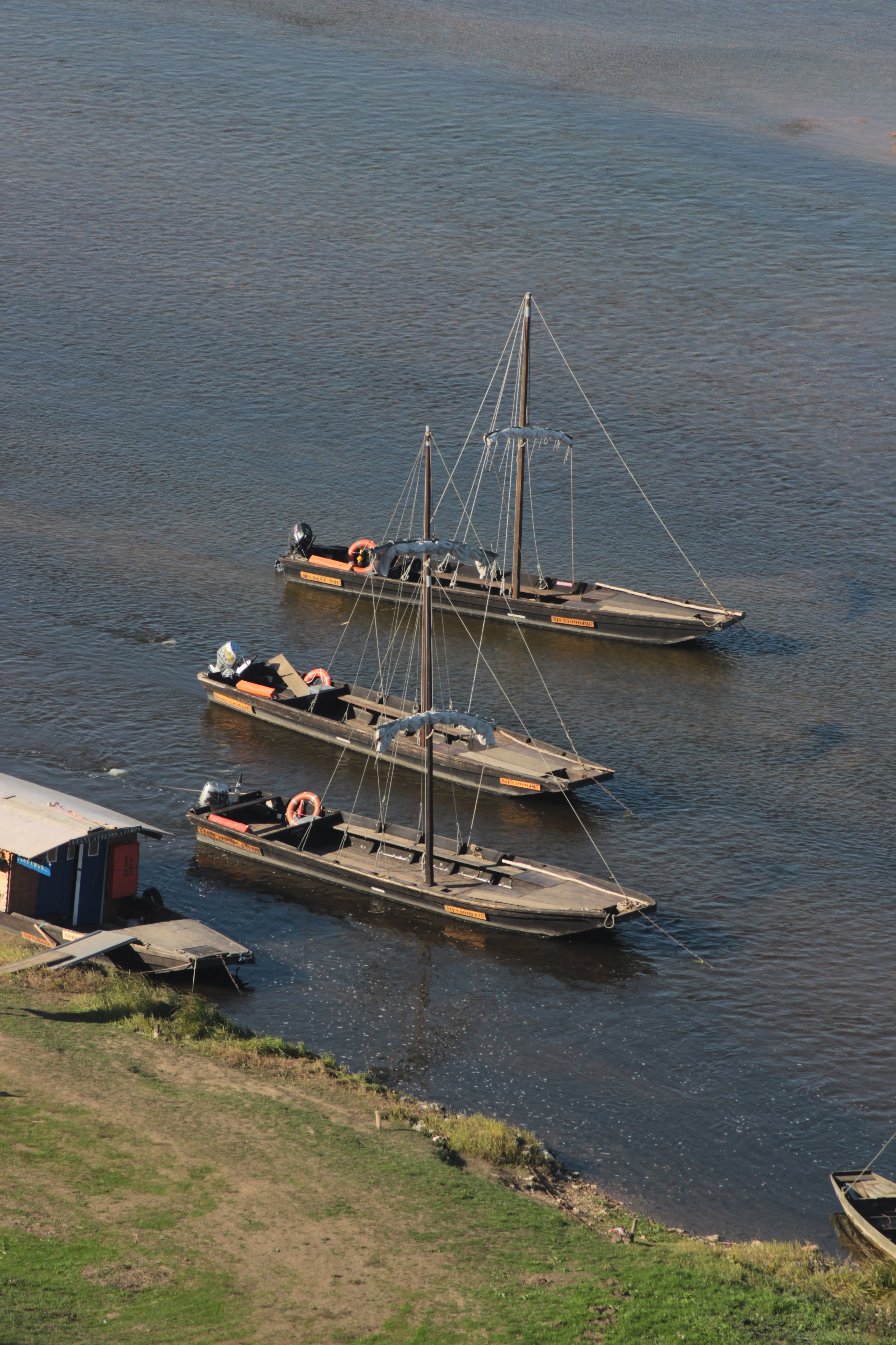 Trois barques traditionnelles de la Loire, à fond plat et voile carrée.